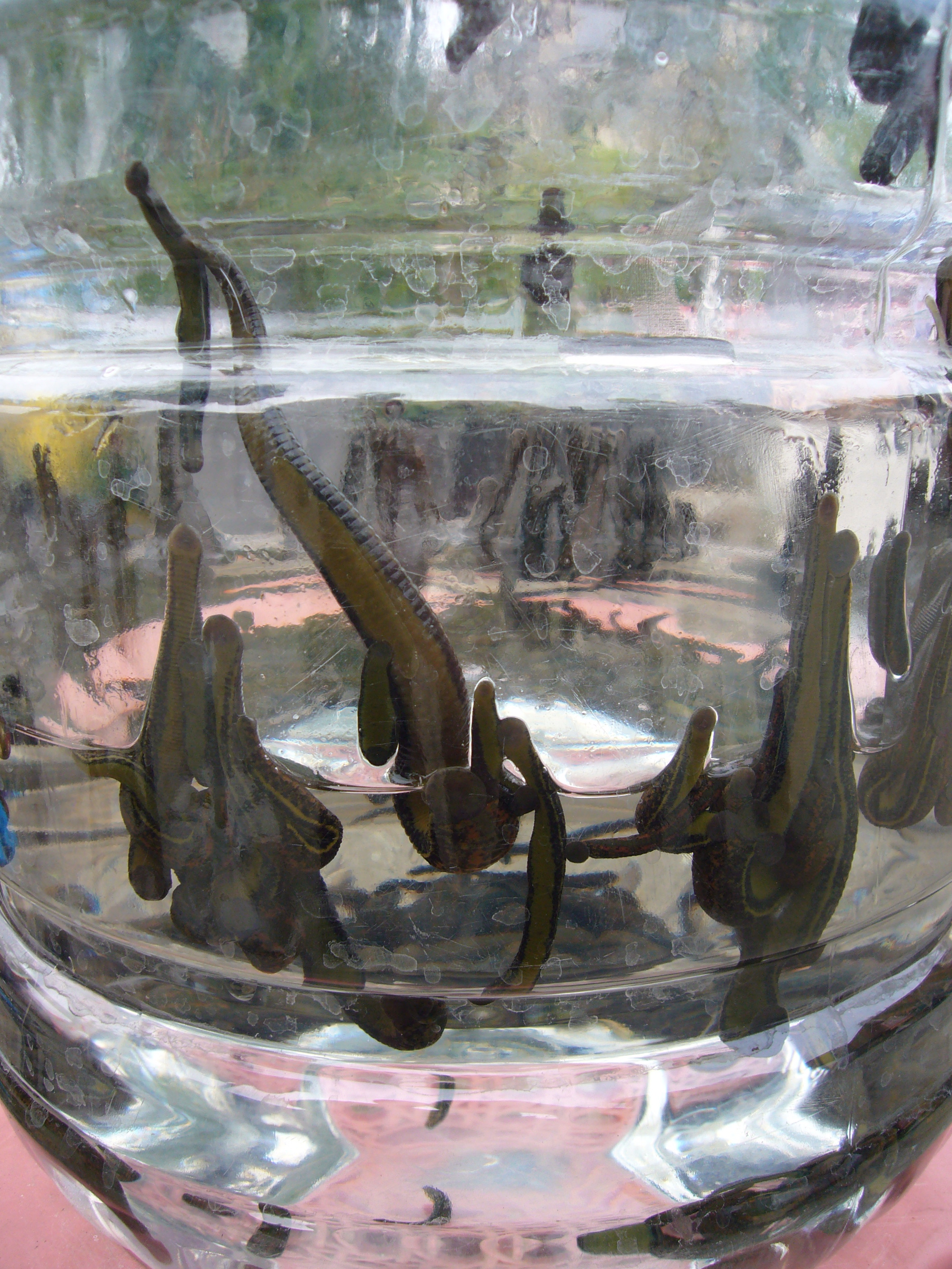 Sanguisughe al bazar egiziano di Istanbul